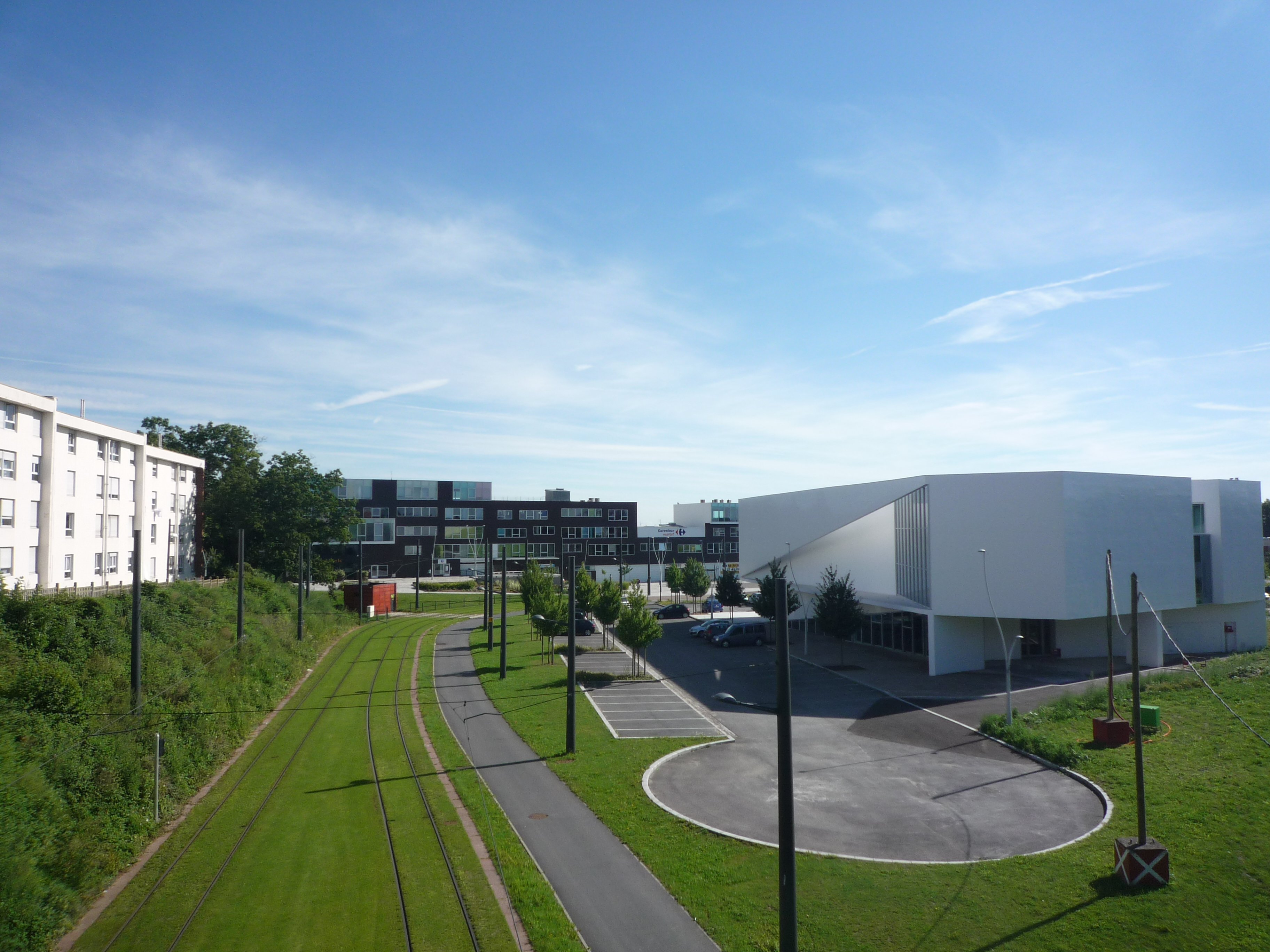 Anzin, Nord, Nord-Pas-de-Calais, France.